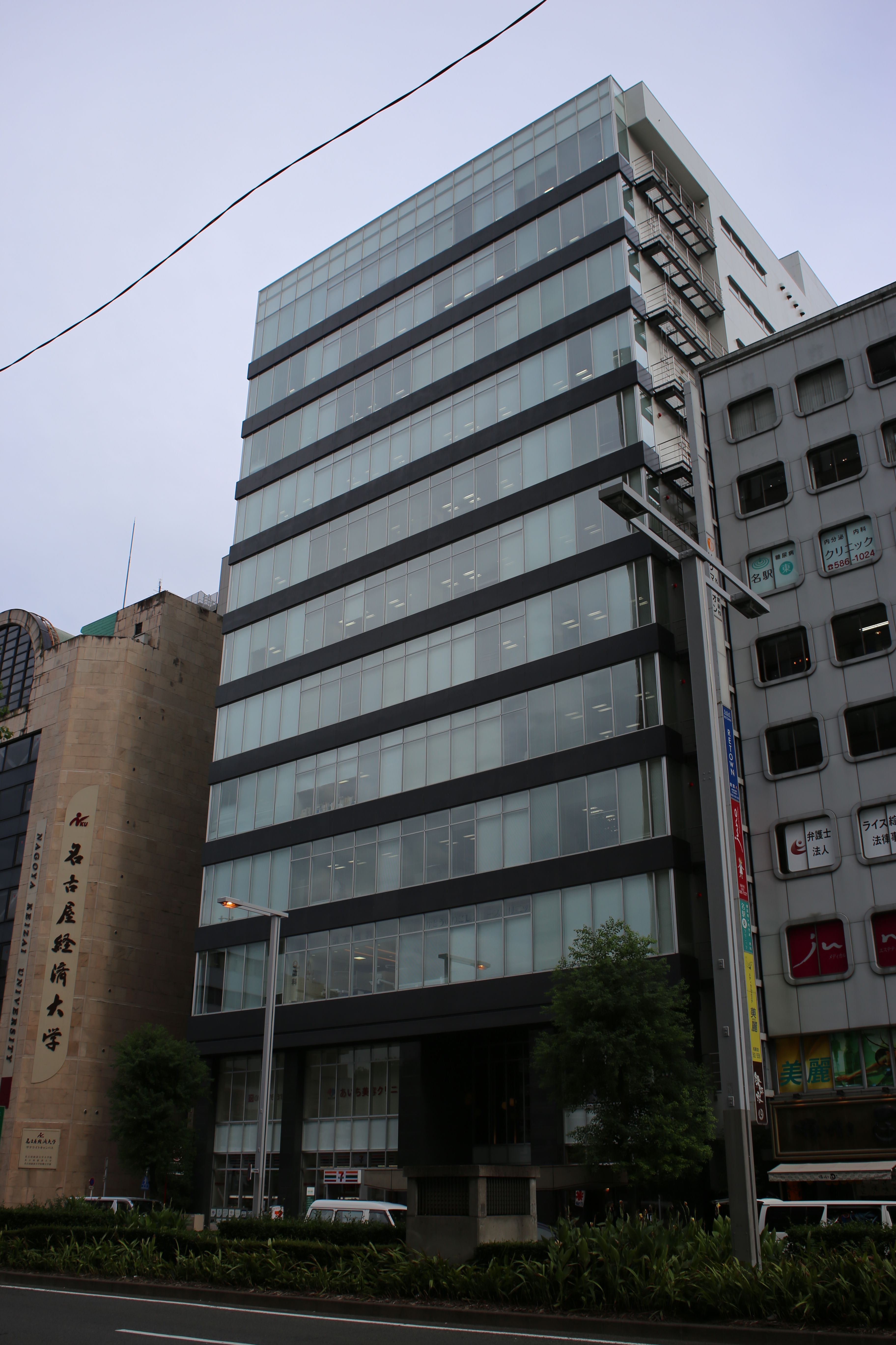 名古屋市中村区名駅四丁目のメイフィス名駅ビルを北側公道西側より撮影